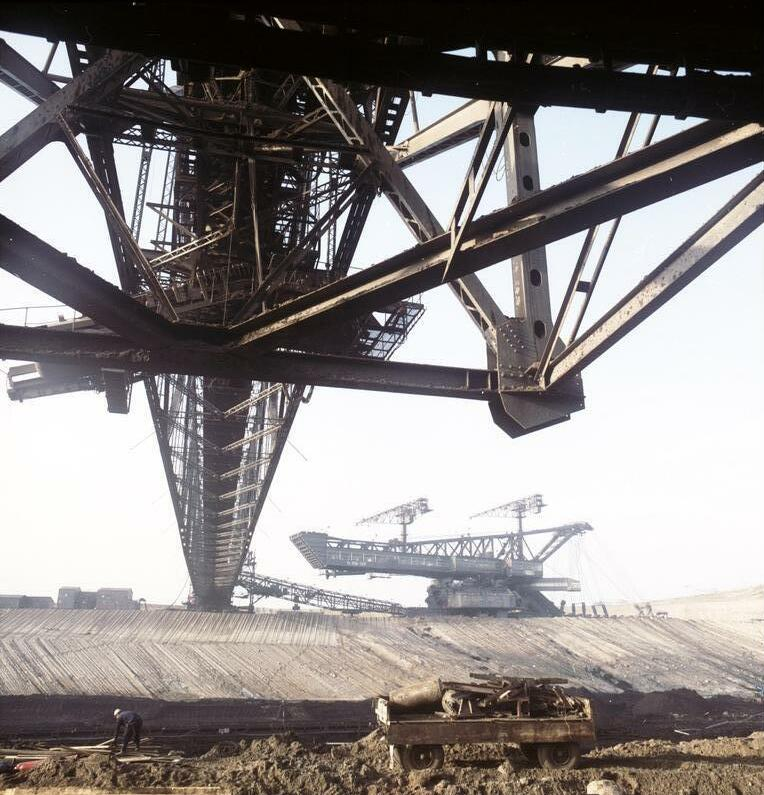 ADN-ZB / Gahlbeck / 12.11.81 / Bez. Leipzig: Tagebau Delitzsch Süd-West Eine Teilansicht der Förderbrücke im Tagebau Süd-West der BKK Bitterfeld. Nach der planmäßigen Reparatur der Brücke ist ein stabiler Winterbetrieb gewährleistet. Damit wurde die Voraussetzung geschaffen, bis zu Jahresende 2 485 000 Kubikmeter Abraum zu bewegen, was ein Planplus von drei Tagen bedeutet.